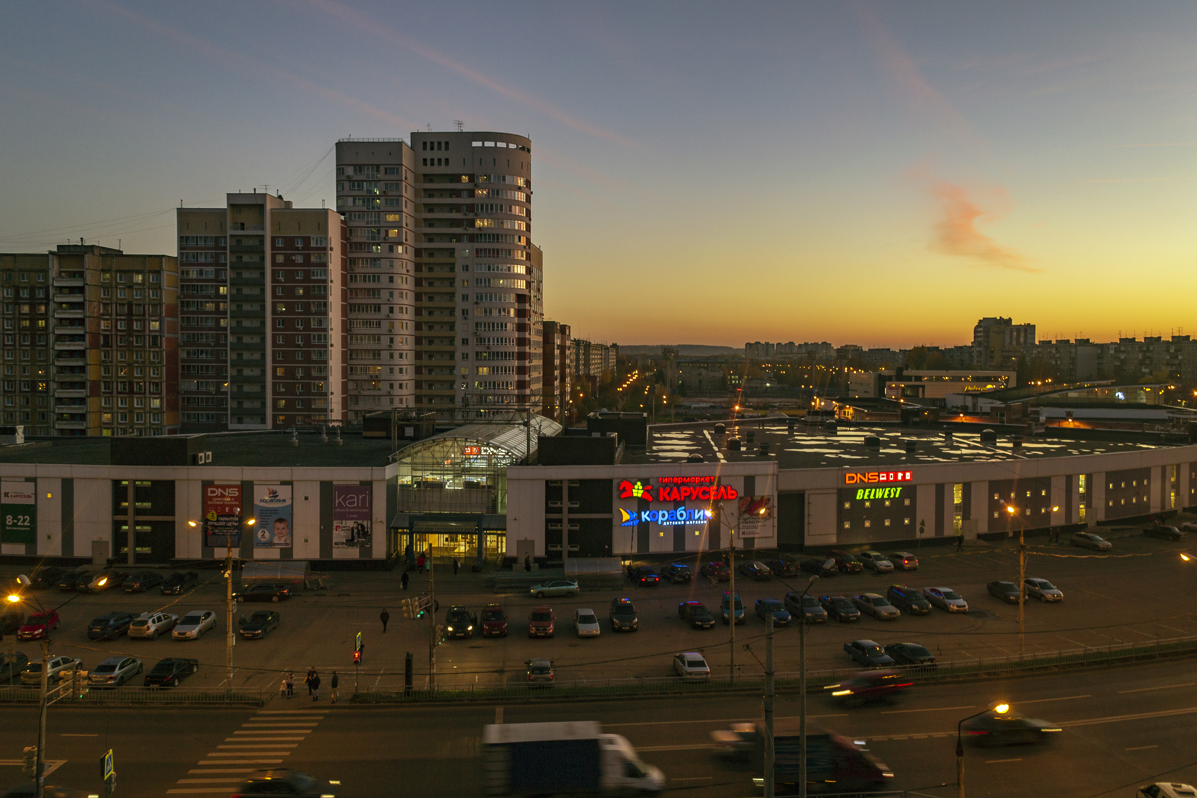 Улица Плотникова в Нижнем Новгороде. Микрорайон Соцгород II